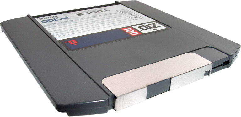 Motiv: Speichermedium vom Typ zip 100 der Firma iomega. Die Abmessungen des Mediums betragen ca. 98 mm × 99 mm × 7 mm. Aufnahmedatum: 2004-06-26 Aufnahmeort: Studio Bildname: Iomega_zip-100-Disk_01_KMJ.jpg Bildgröße: 768 Pixel x 374 Pixel (35.930 Bytes)